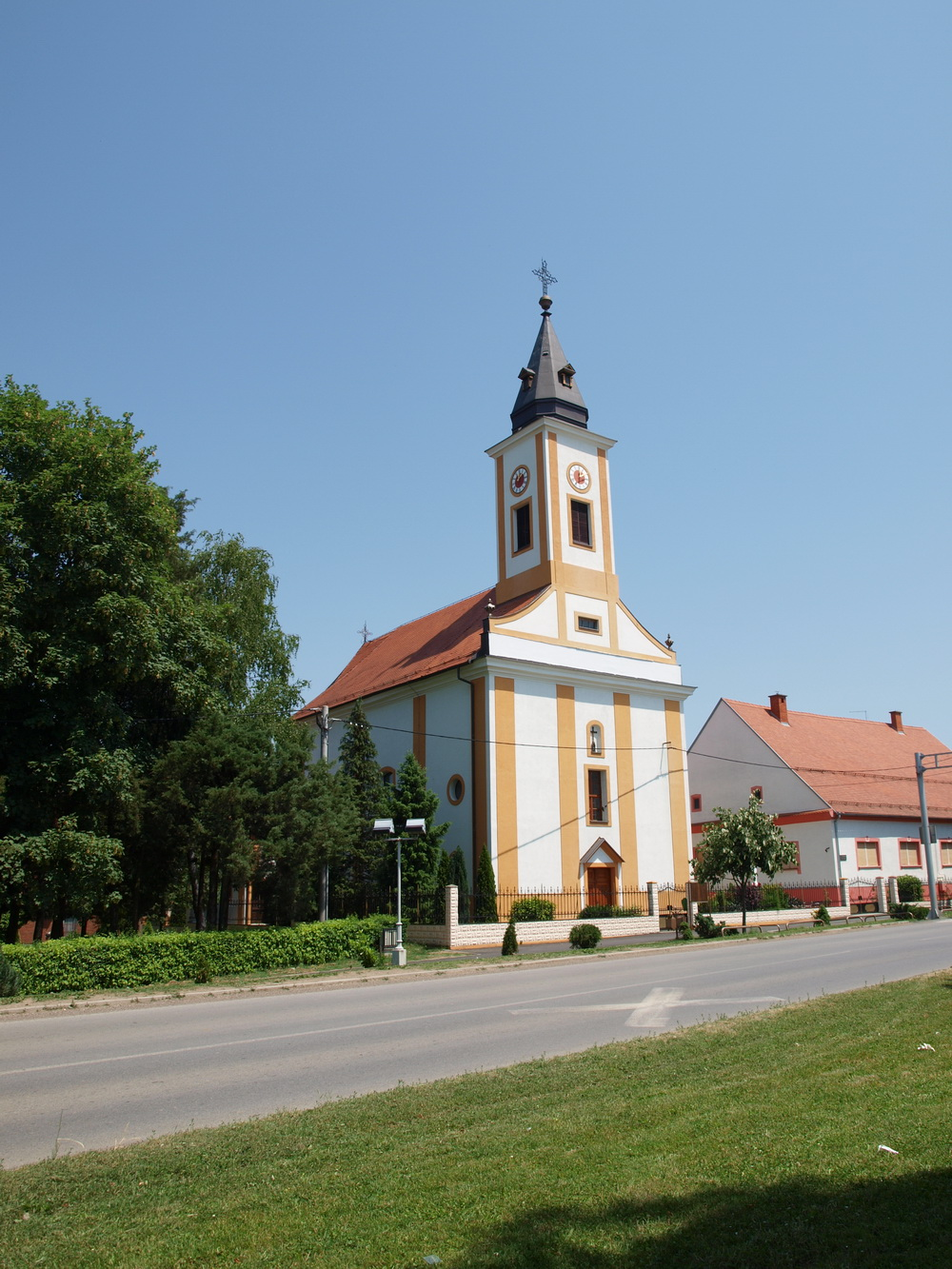 Crkva Sv. Andrije u Donjim_Andrijevcima, Brodsko-posavska županija.